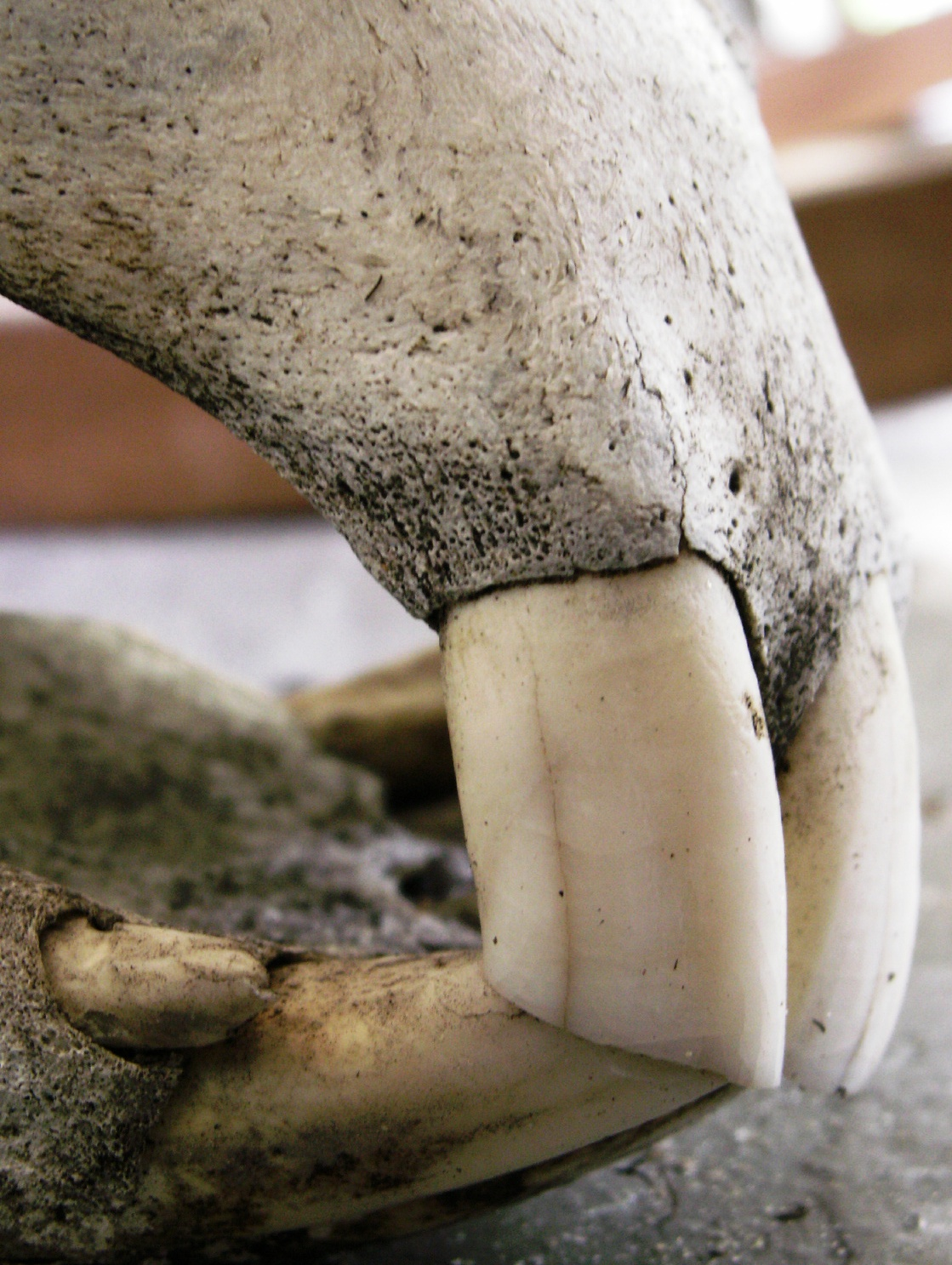 horse teeth